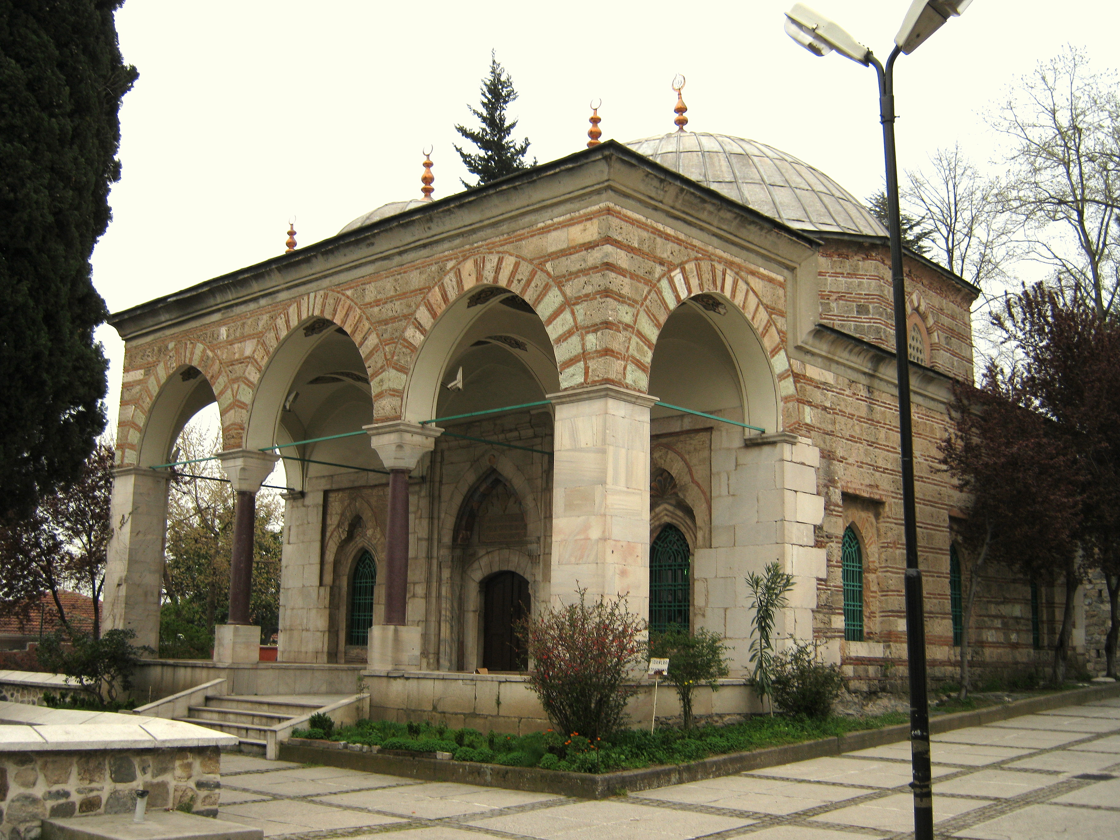 YILDIRIM BEYAZIT KÜLLİYE BURSA